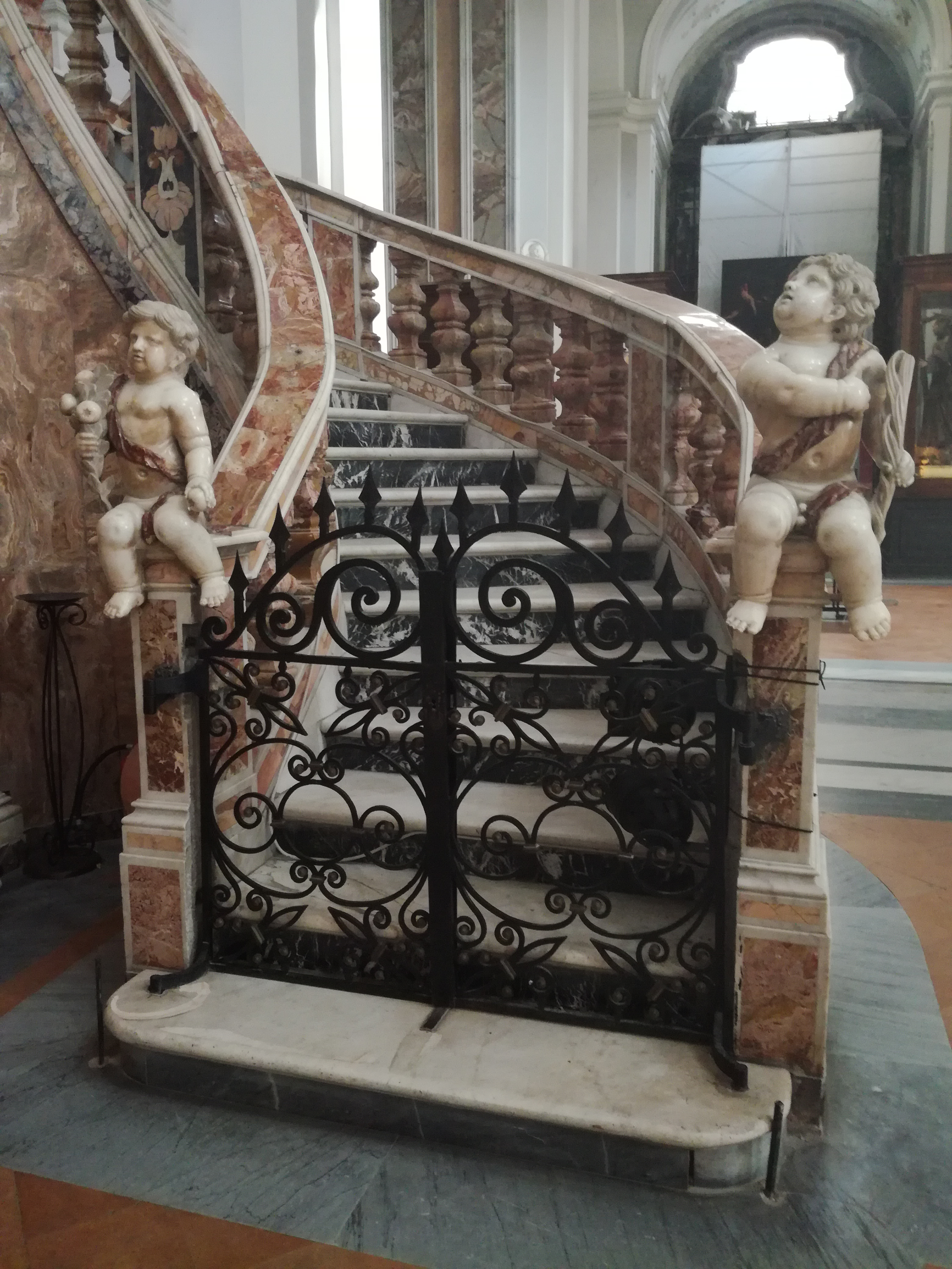 Basilica di Santa Maria della Sanit, Particolare delle sculture